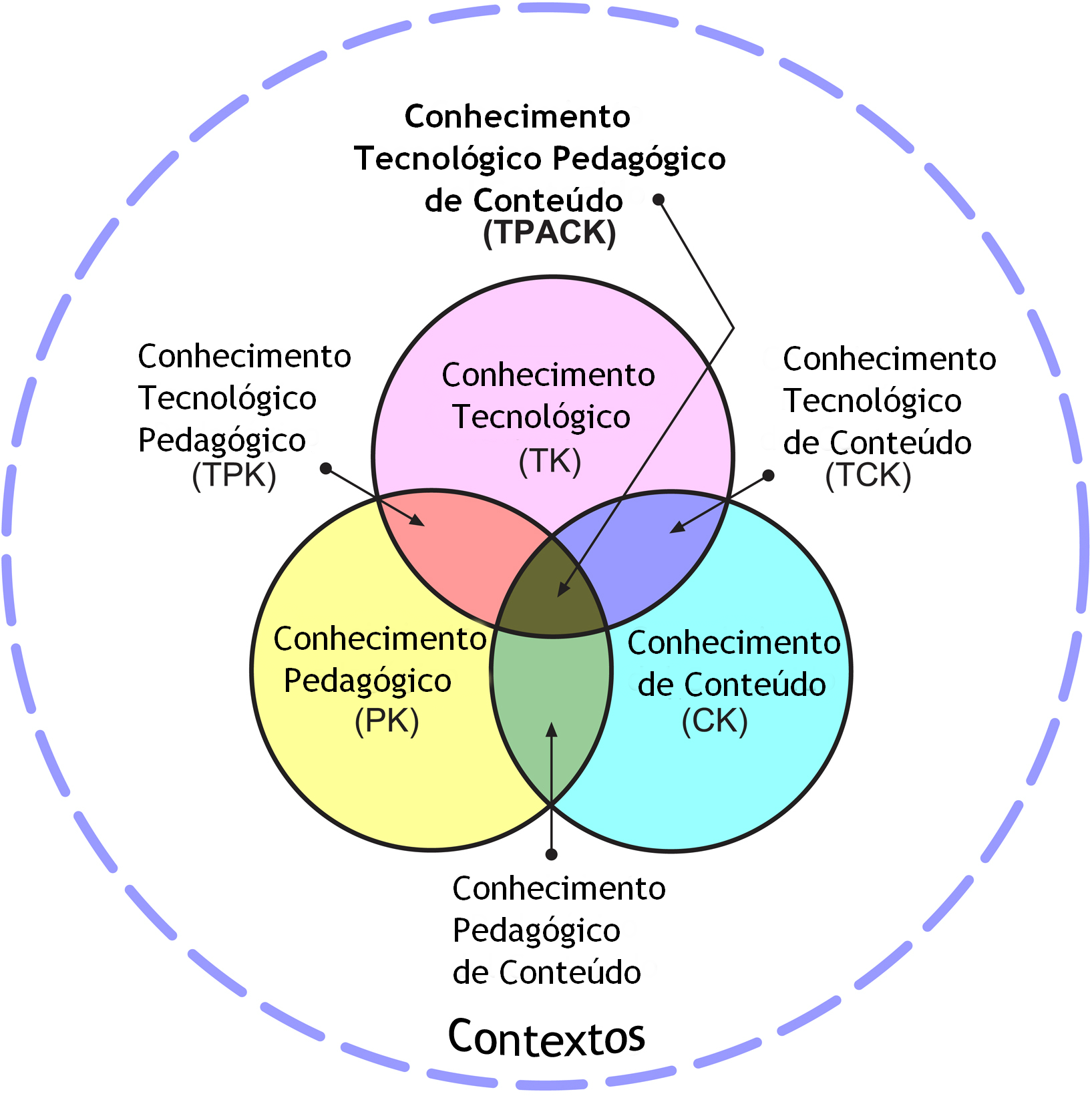 O Conhecimento Tecnológico Pedagógico de Contenido, TPACK por saus siglas em inglês, trata de algumas das qualidades essenciais do conhecimento requeridas pelo professor para integrar tecnologia em suas práticas de ensino.